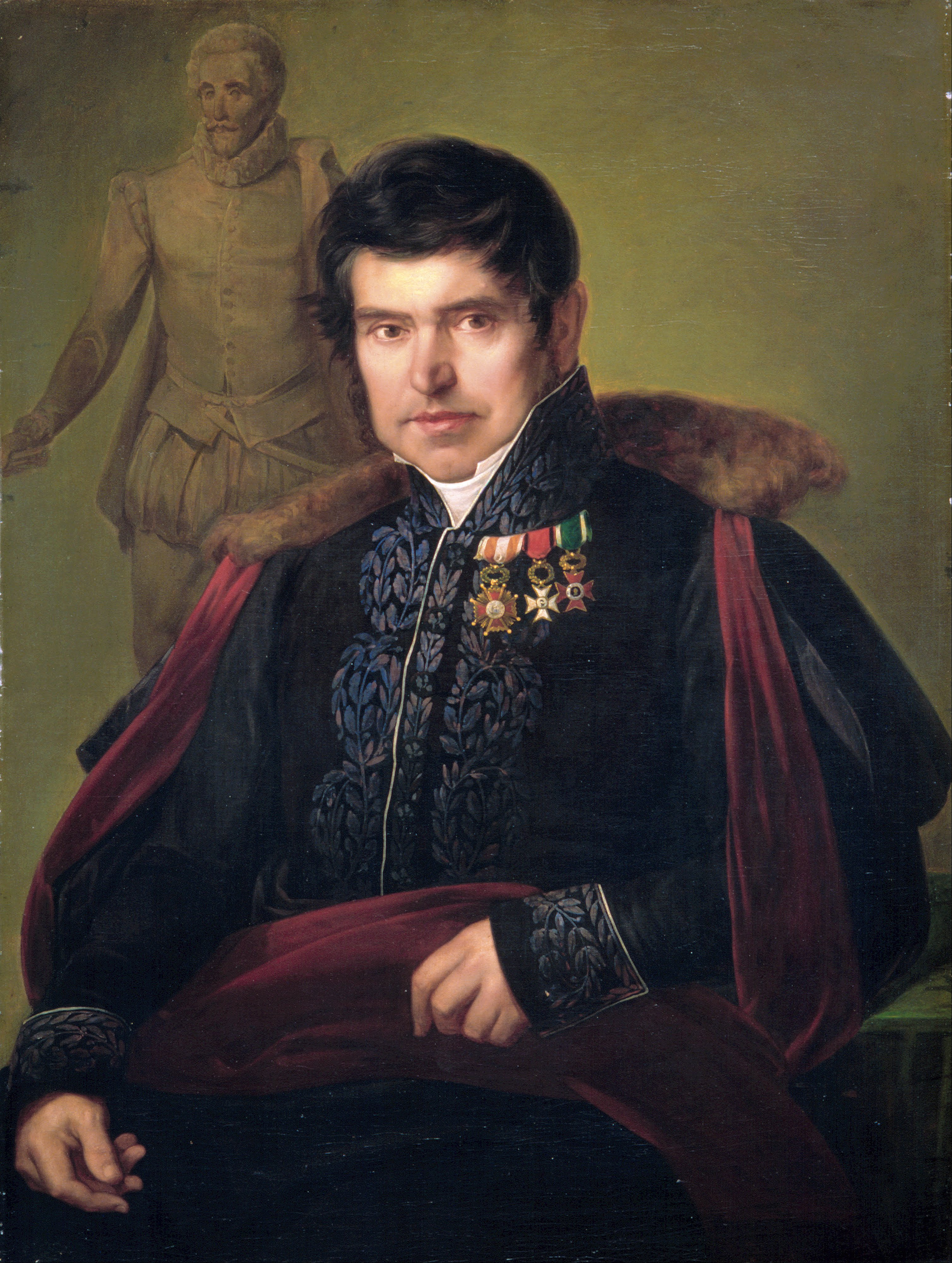 Retrato del escultor español Antonio Solá (1780-1861).